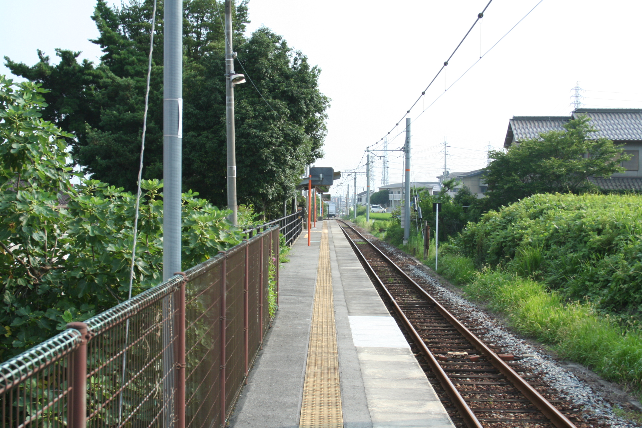 滝駅。JR西日本加古川線の鉄道駅。 ホームの北側から見た滝駅のホーム。